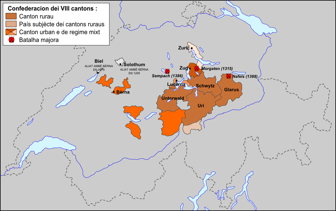 Confederacion dei VIII Cantons vèrs 1385.